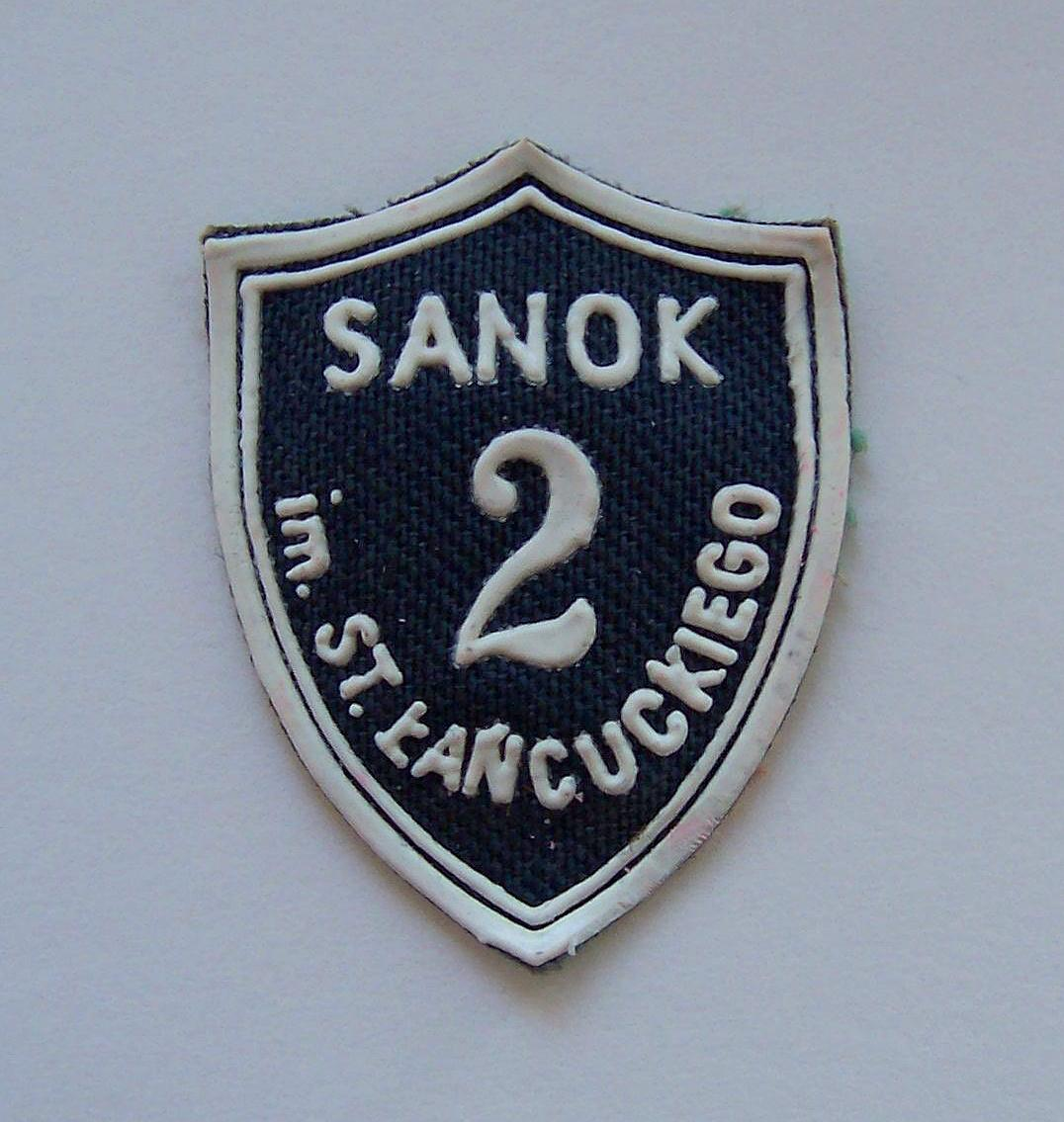 Tarcza szkolna na fartuszek uczniowski Szkoły Podstawowej nr 2 im. Stanisława Łańcuckiego w Sanoku.